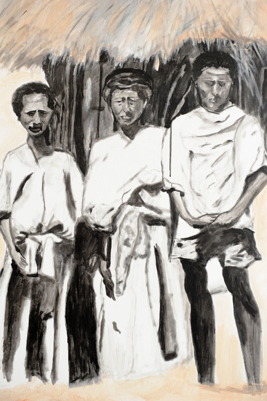 זכרונות - עבודתה של האמנית דגה פדר; אקריליק על בד